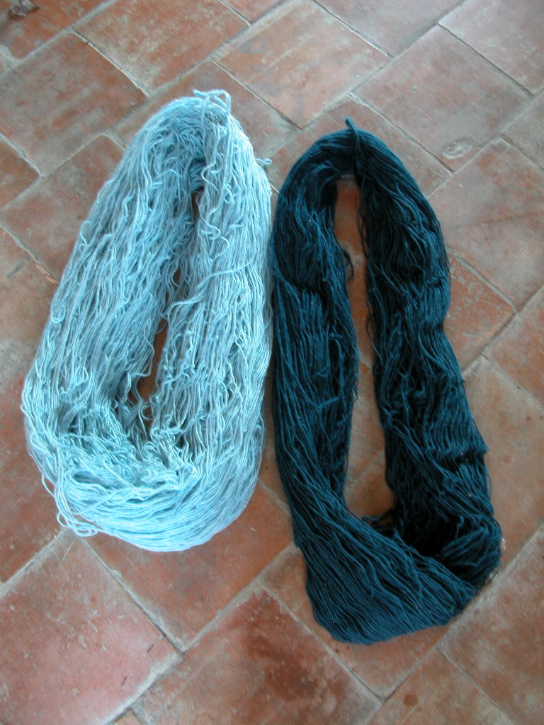 foto mia personale, matasse di lana, 2007 Licensing Categoria:Immagini sulla tessitura